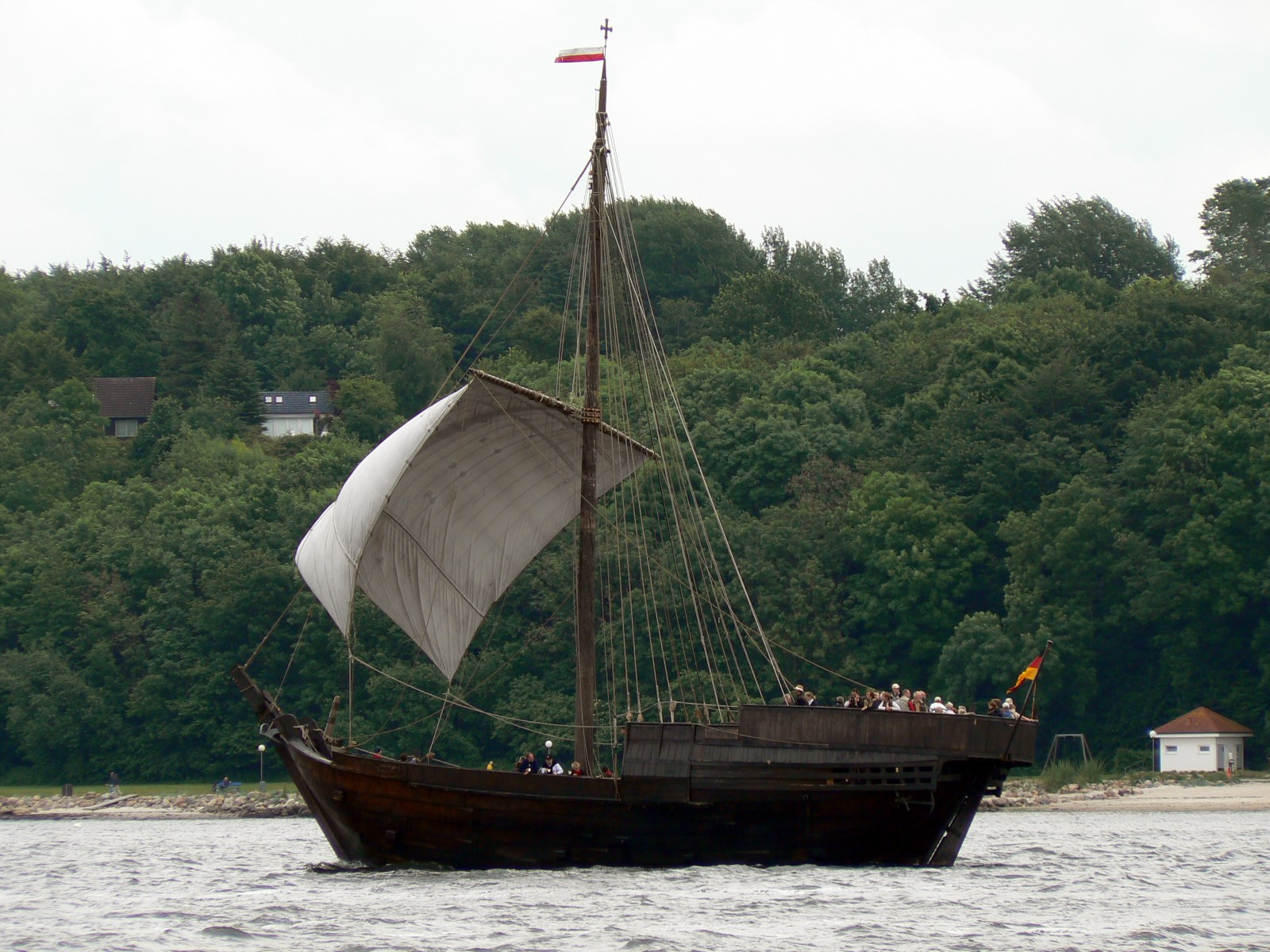 Segelschiff (Kogge) Kieler Hansekogge auf der Kieler Woche 2007. Nachbau der bei Bremen 1962 aufgefundenen Bremer Kogge von 1380. Fertigstellung des Nachbaus: 1991.